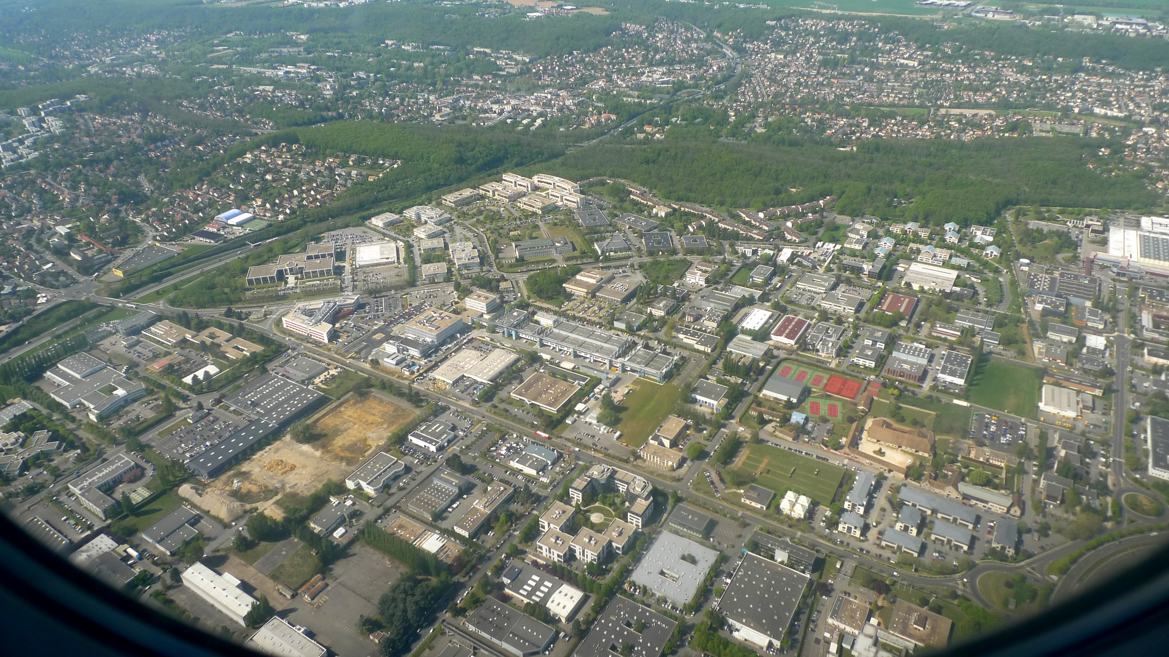 vue d'avion du parc d'activité de Courtaboeuf, Villebon sur Yvette, France